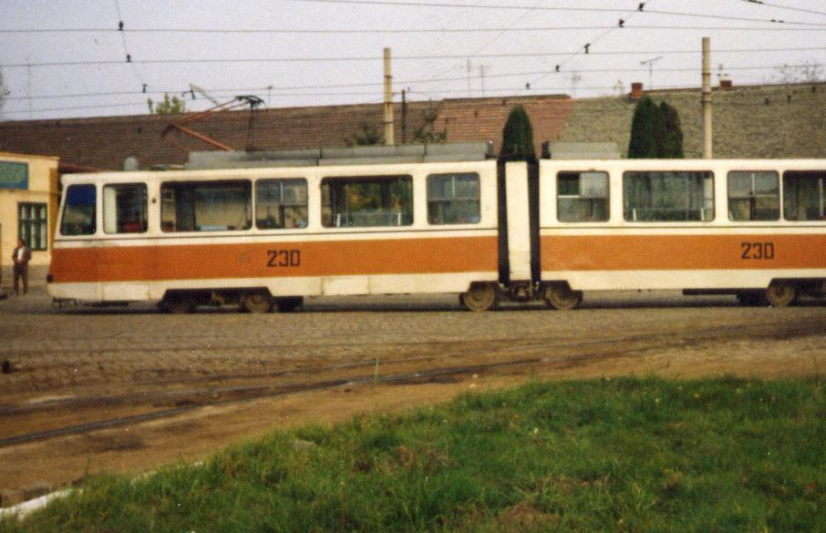 Tramvai Timisoara, tramvai articulat 230